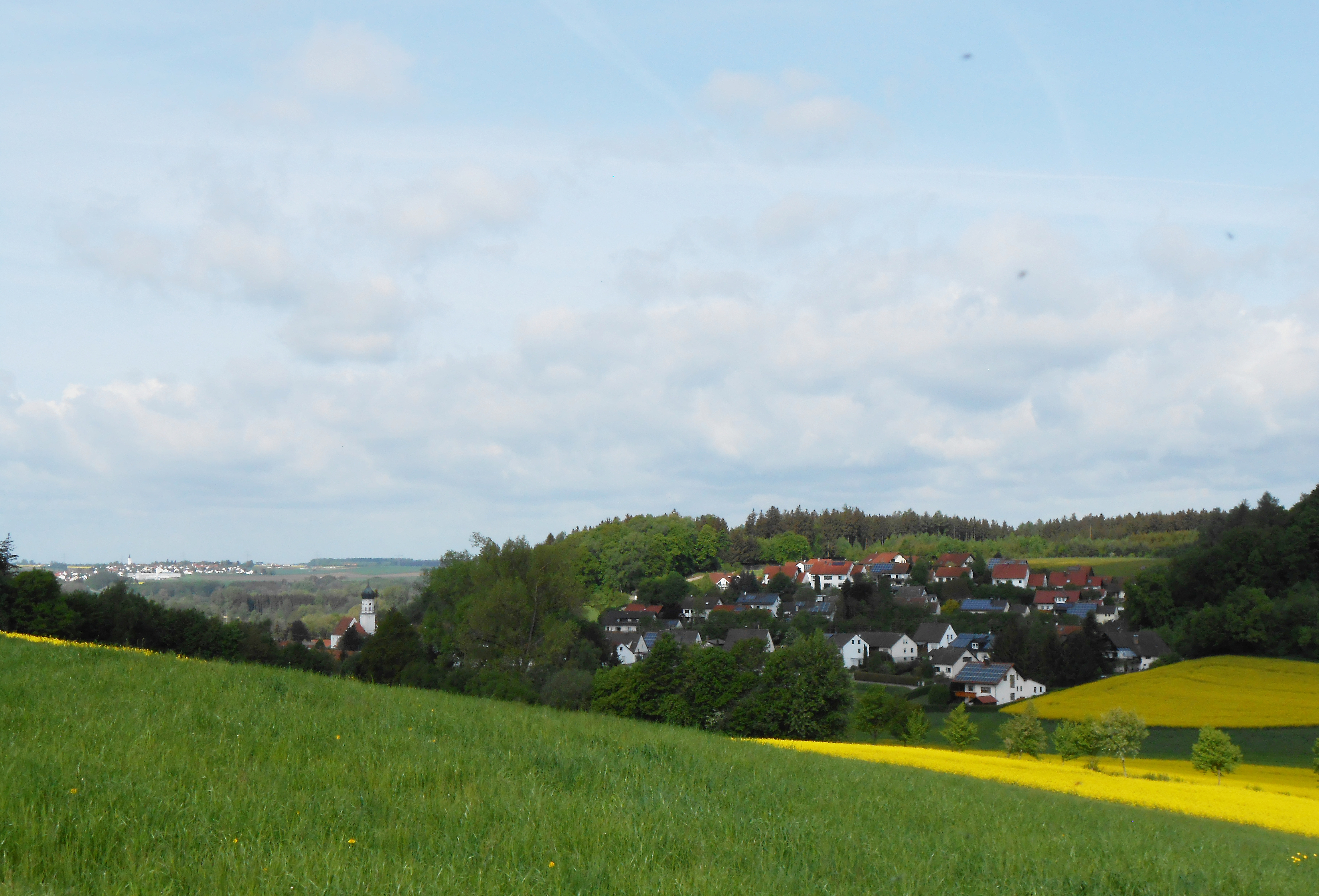 von einem Berg in der Nähe von Dürrlauingen aus betrachtet